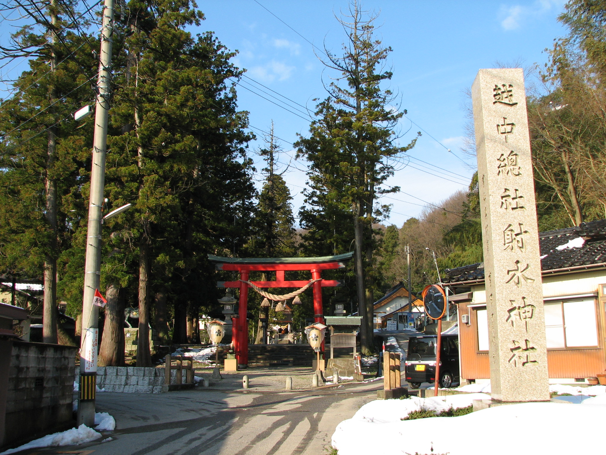 Futagami-imizu-jinja, Takaoka, Toyama, Japan 二上射水神社（富山県高岡市）社号標